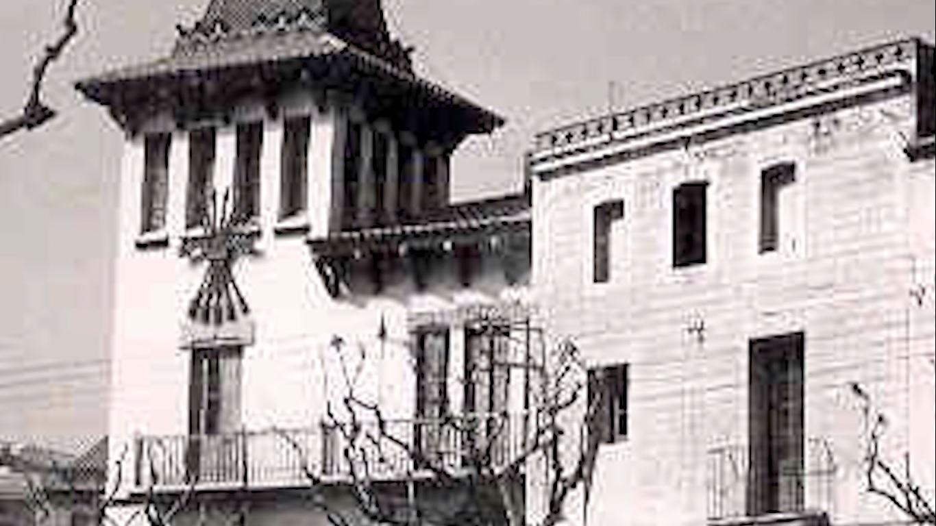 Ajuntament amb símbol franquista i falangista,FET y de las JONS "yugo y flechas" a la seva façana, des dels anys 40 fins als 70.